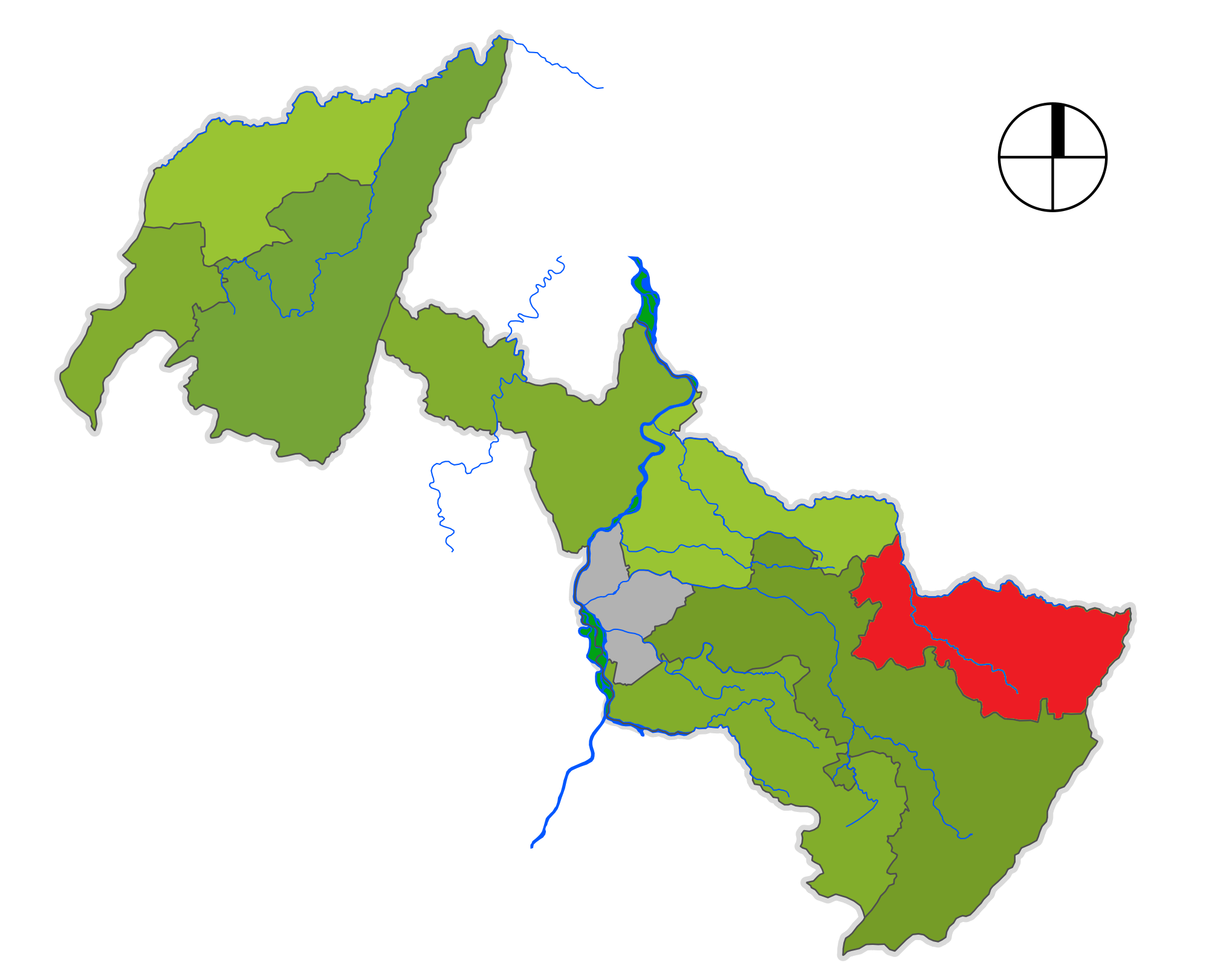 Corregimiento de Neiva Vegalarga, departamento del Huila, Colombia.